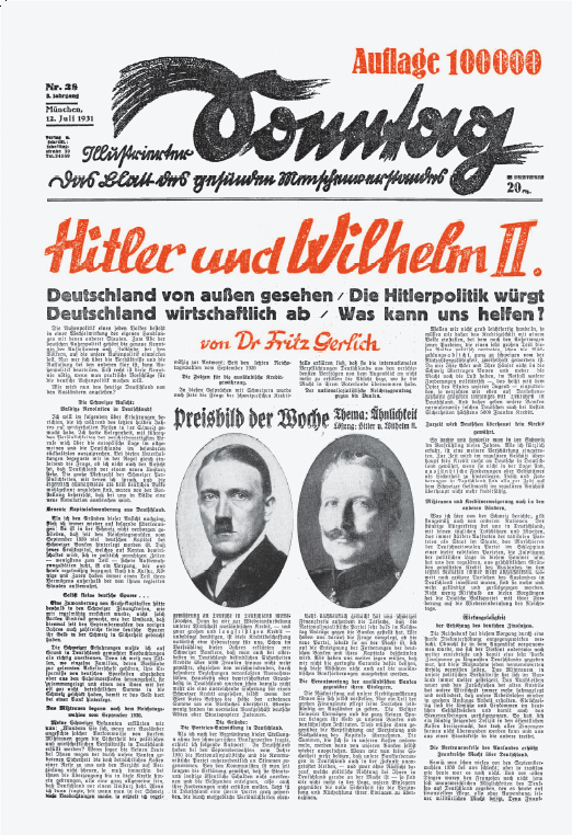 Titelseite der Wochenschrift Illustrierter Sonntag